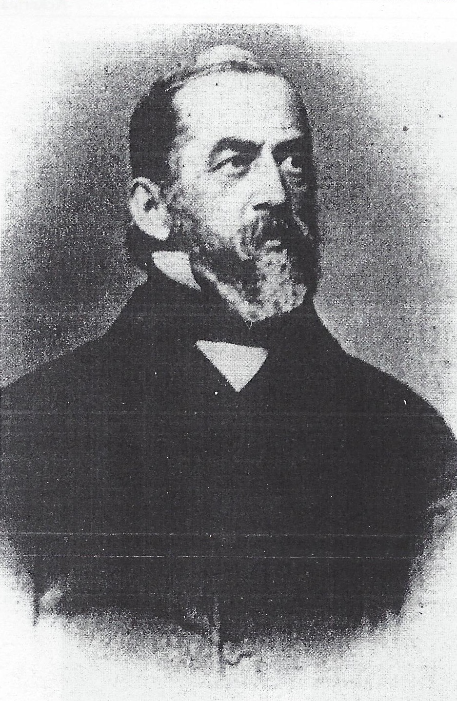 Porträtfotografie von Robert von Benda (1816-1899), Mitglied des Reichstags